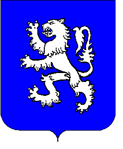 Armes de Jean-Gabriel de Raspaud, Chevalier de Malte - 1608